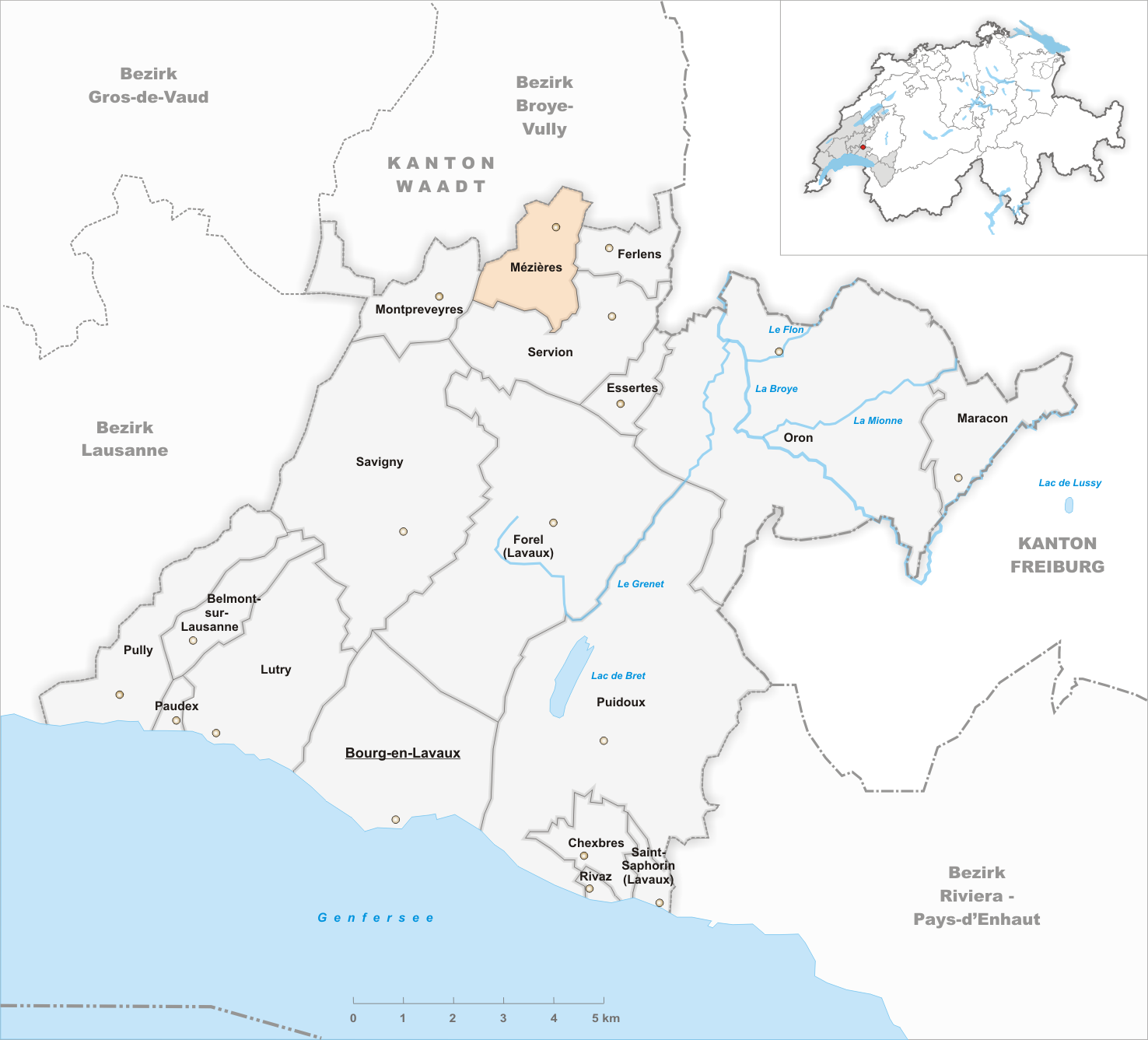 Municipality Mézières